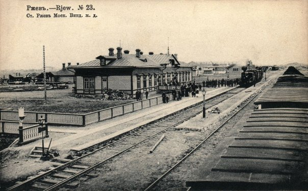 Ржев Балтийский. 1902 год